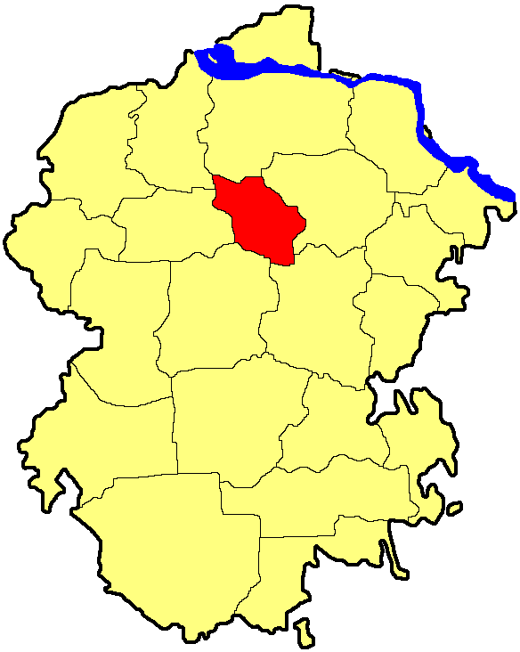 Красноармійський район Чувашії